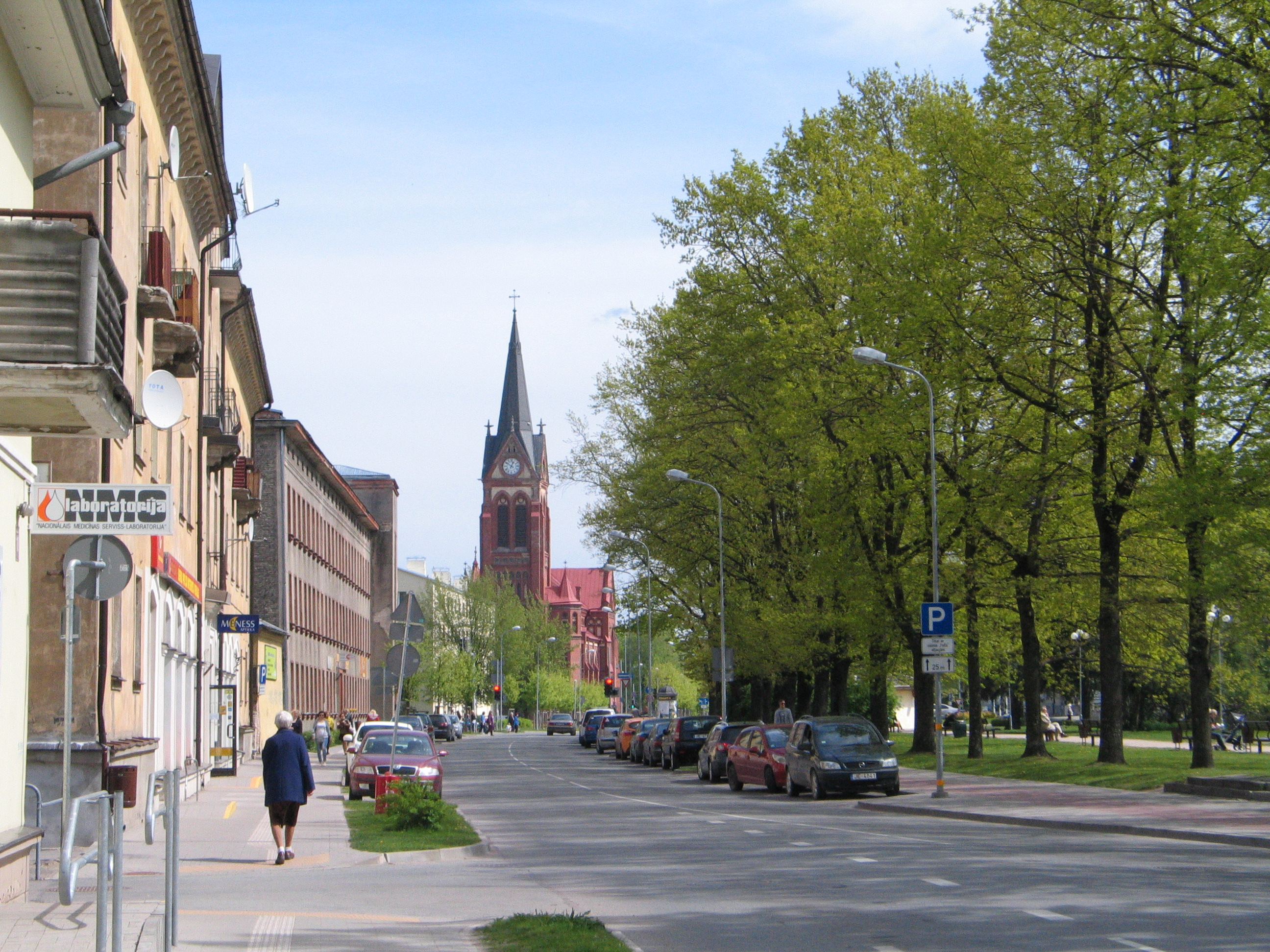 Улица Райниса в Елгаве